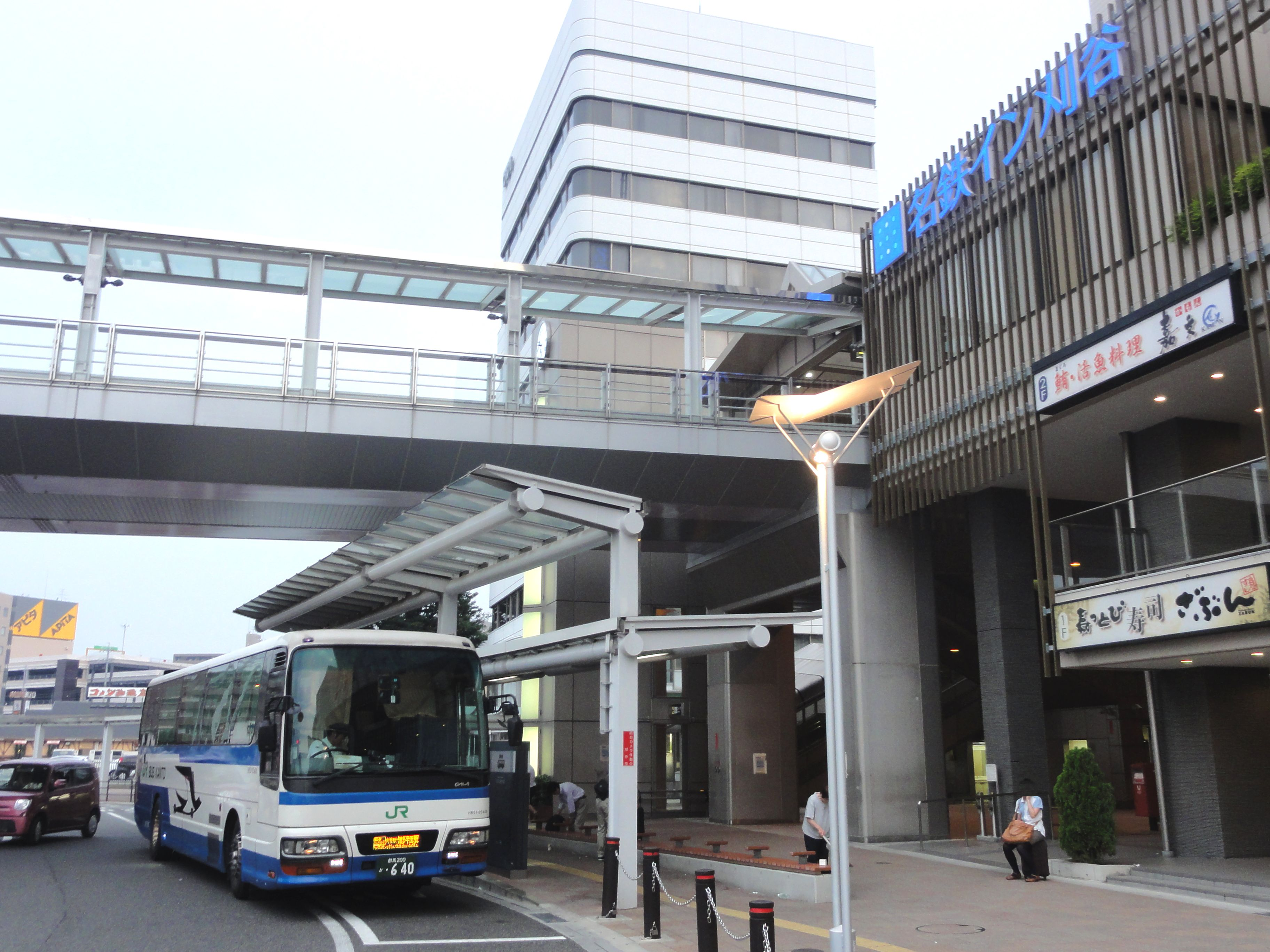 Chita Seagull 知多シーガル号